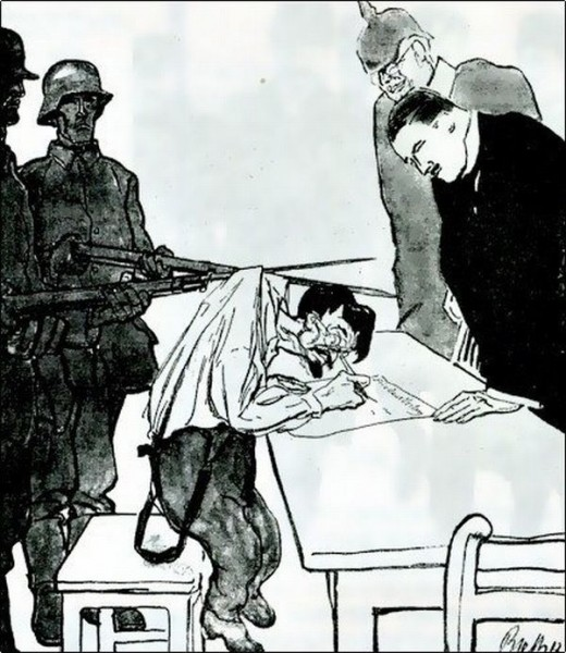 “Trotzki lernt schreiben” (als Volkskommissar des Äußeren bei den Friedensverhandlungen von Brest-Litowsk, 28.11.1917–3.3.1918). Karikatur, 1917, von Paul Rieht. Aus: Jugend (München) 1918, Nr. 10, S. 184